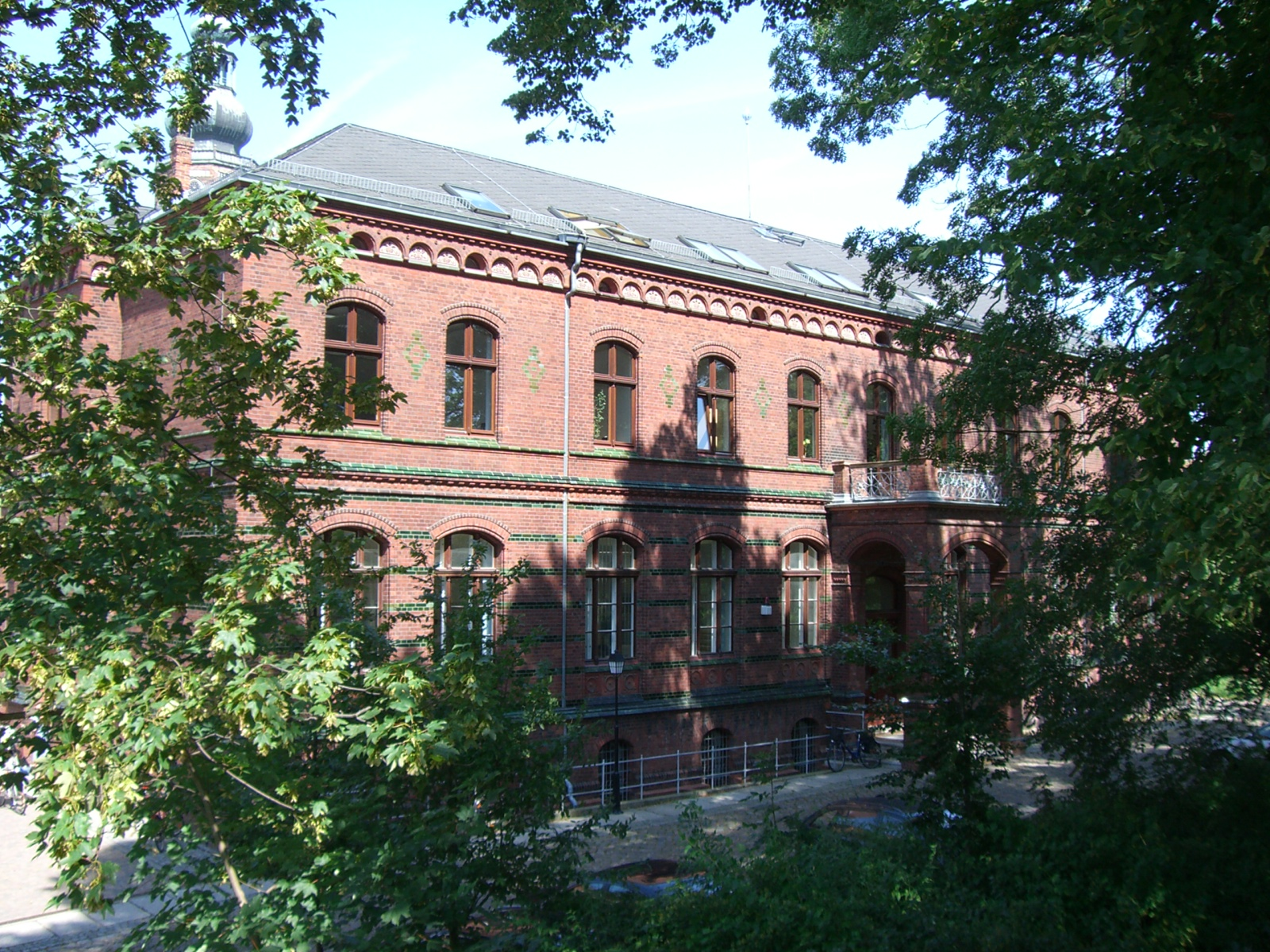 Institut für Deutsche Philologie der Ernst-Moritz-Arndt-Universität Greifswald